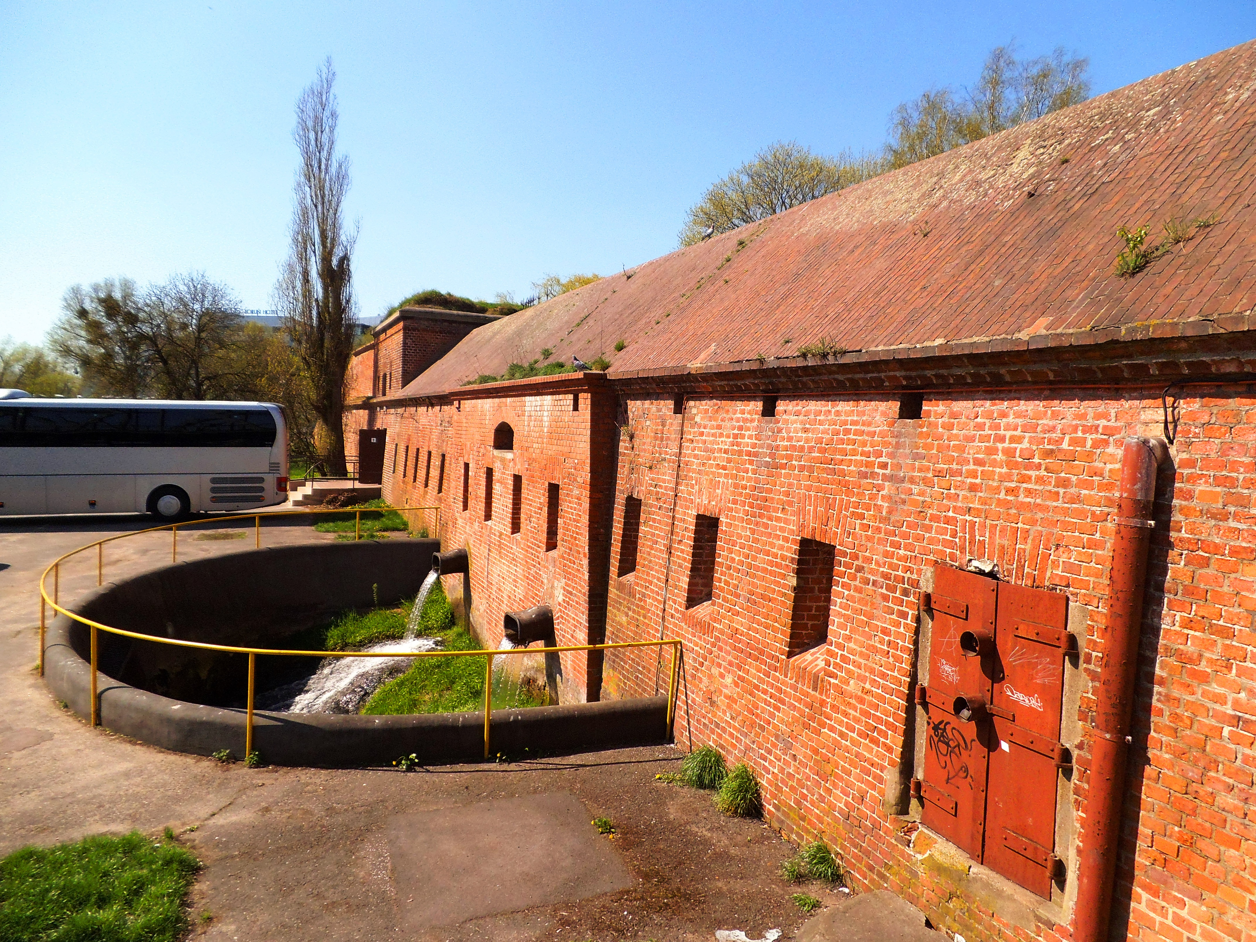 Grodza_V_w_Toruniu1